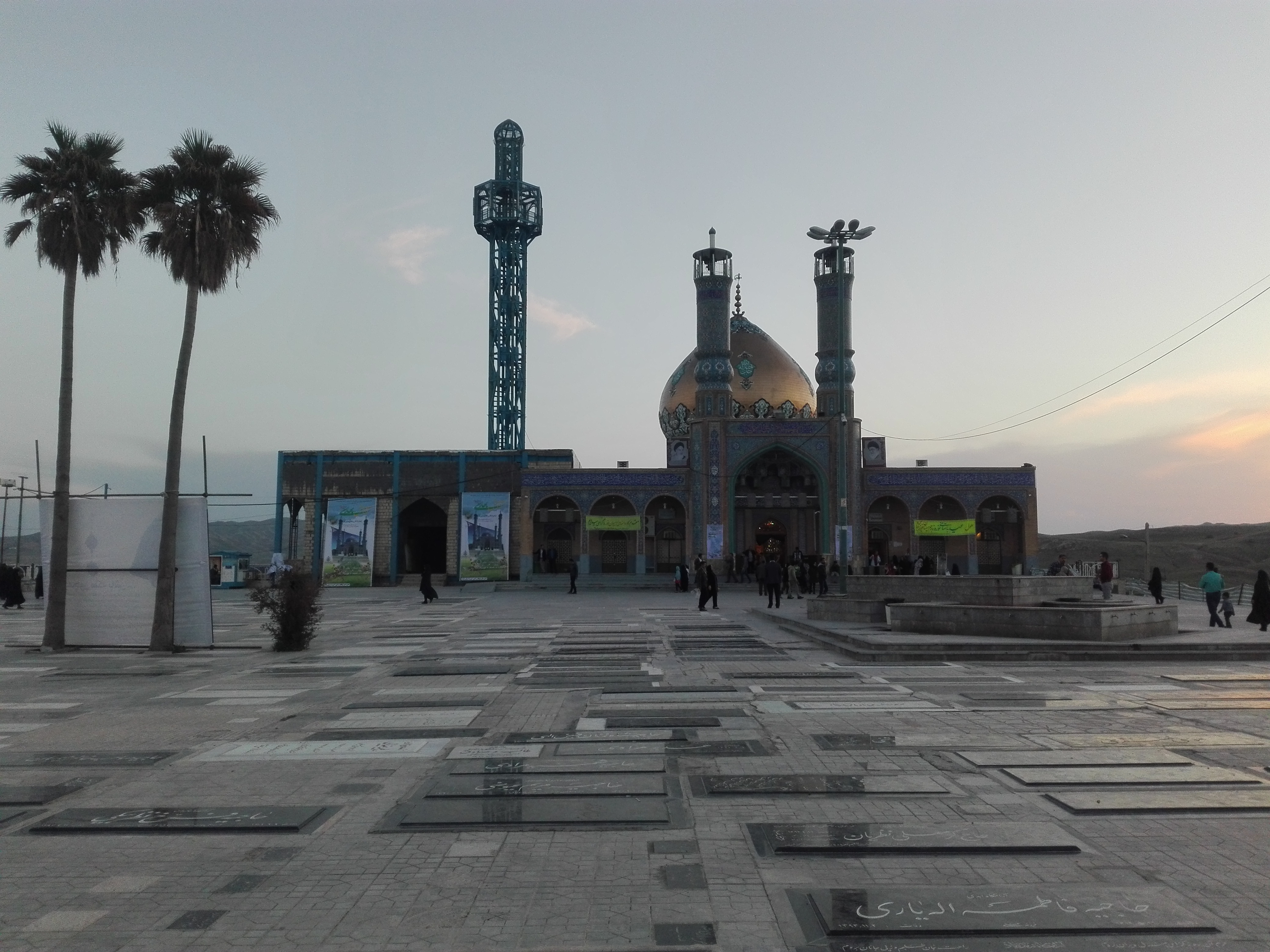 مزار امام زاده علی صالح